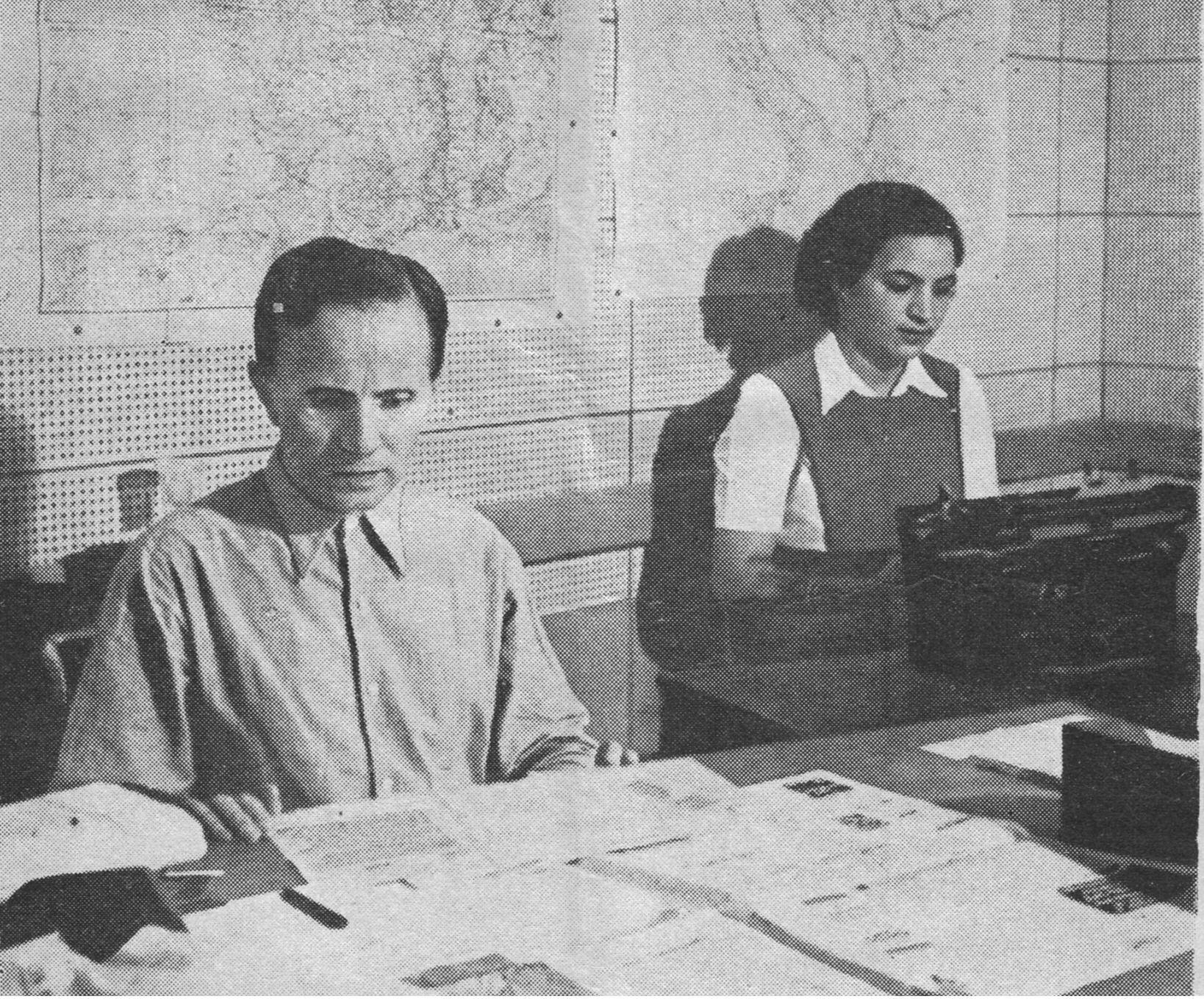 מערכת החדשות העברית של קול ירושלים פורסם בחוברת "הגלגל" בתאריך 20.7.1944.